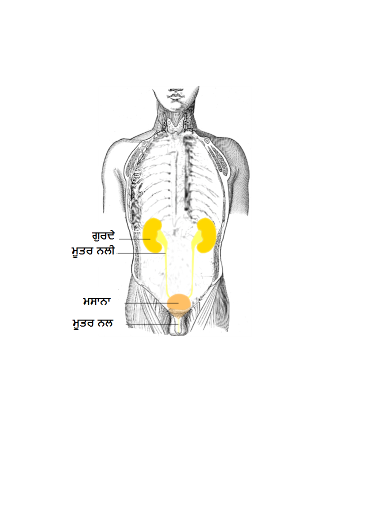 ਪੰਜਾਬੀ: ਮਨੁੱਖੀ ਸ਼ਰੀਰ ਅੰਦਰ ਮੂਤਰ ਪ੍ਰਣਾਲੀ ਨੂੰ ਰੰਗਦਾਰ ਦਿਖਾਇਆ ਗਿਆ ਹੈ।